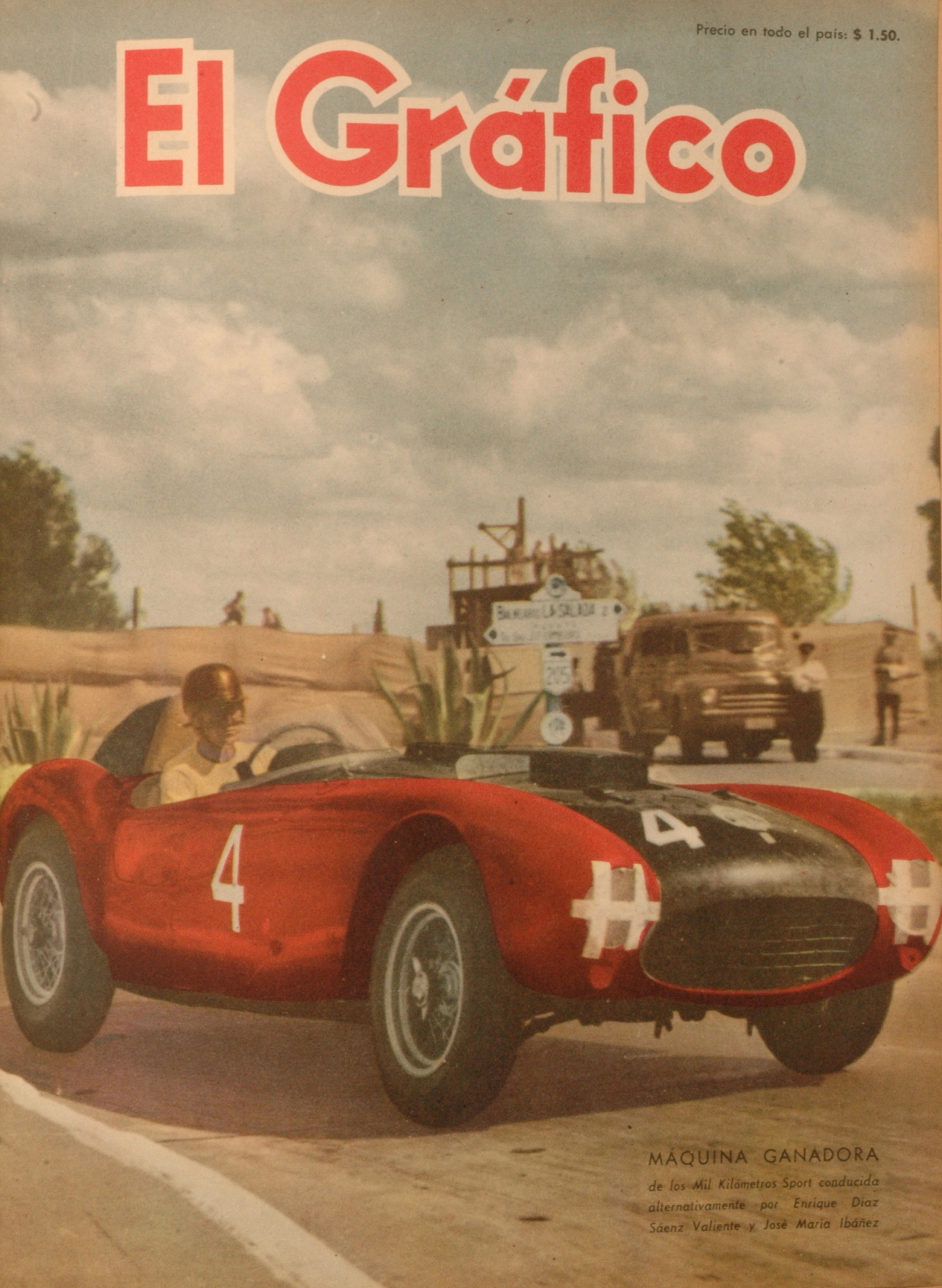 El Grafico del 04 de Febrero de 1955. Edicion 1851